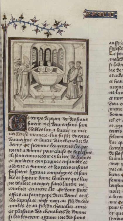 Amie et Amile, chanson de geste